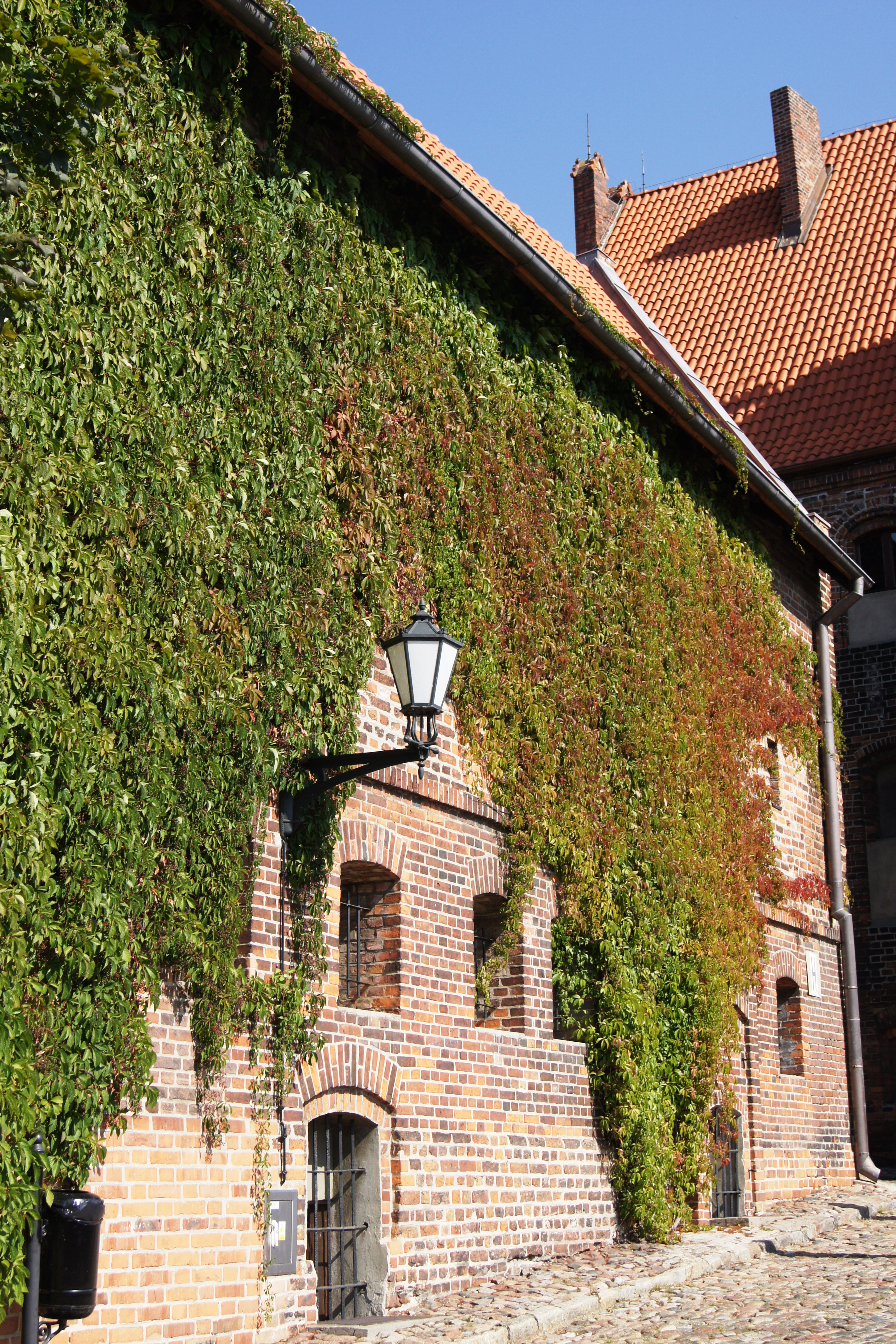 Toruń, ul. Podmurna 1 - dom, pocz. XIV, 1865, 1927 (zabytek nr A/66/199 oraz A/378)